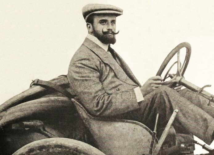 Marc Sorel sur Lorraine-Dietrich, pour le circuit des Ardennes 1906 (7e) - La Vie au Grand Air du 11 août 1906, p.585